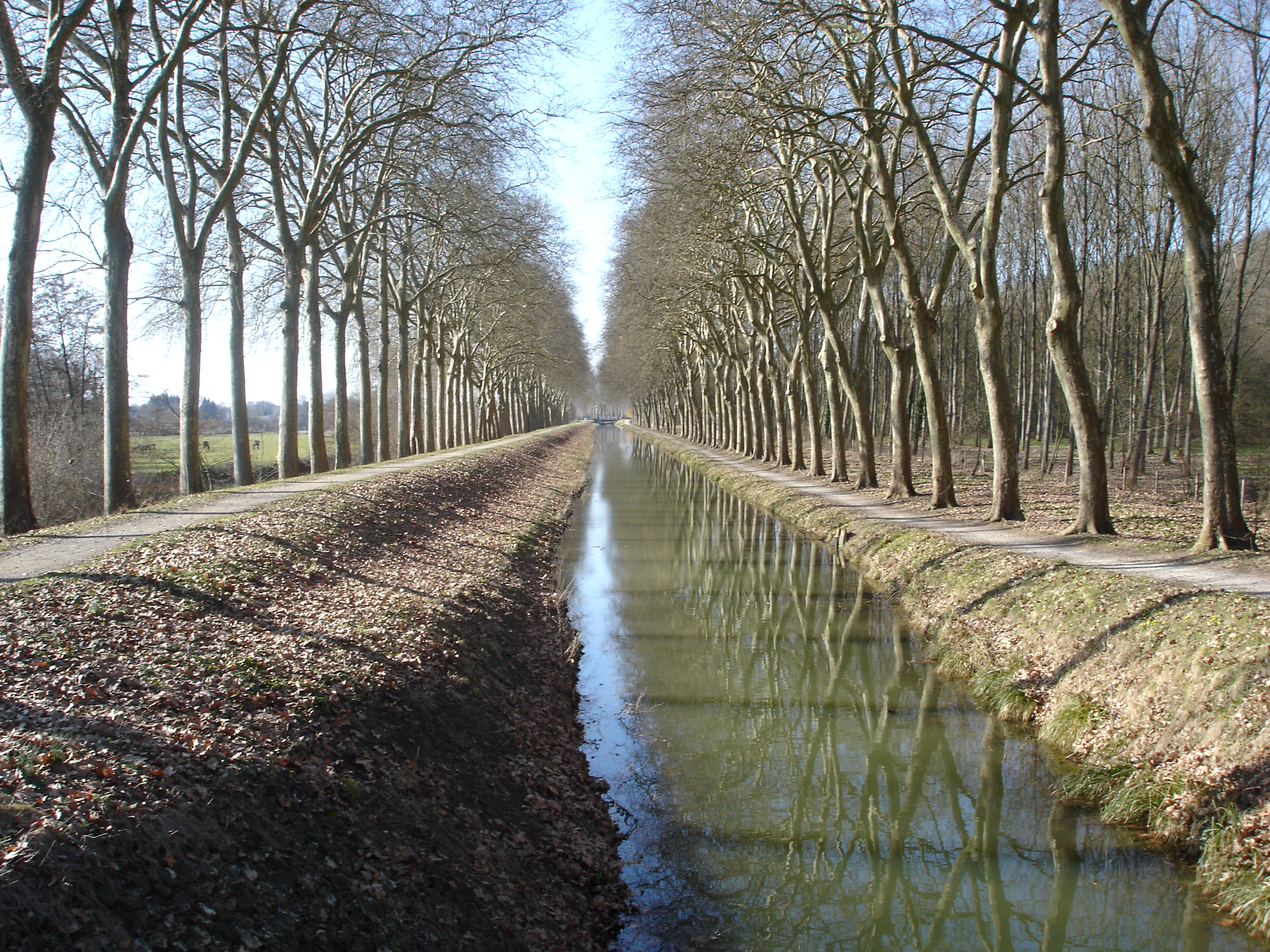 Canal de la Sauldre à Blancafort (Cher)(vue prise du Remblai)